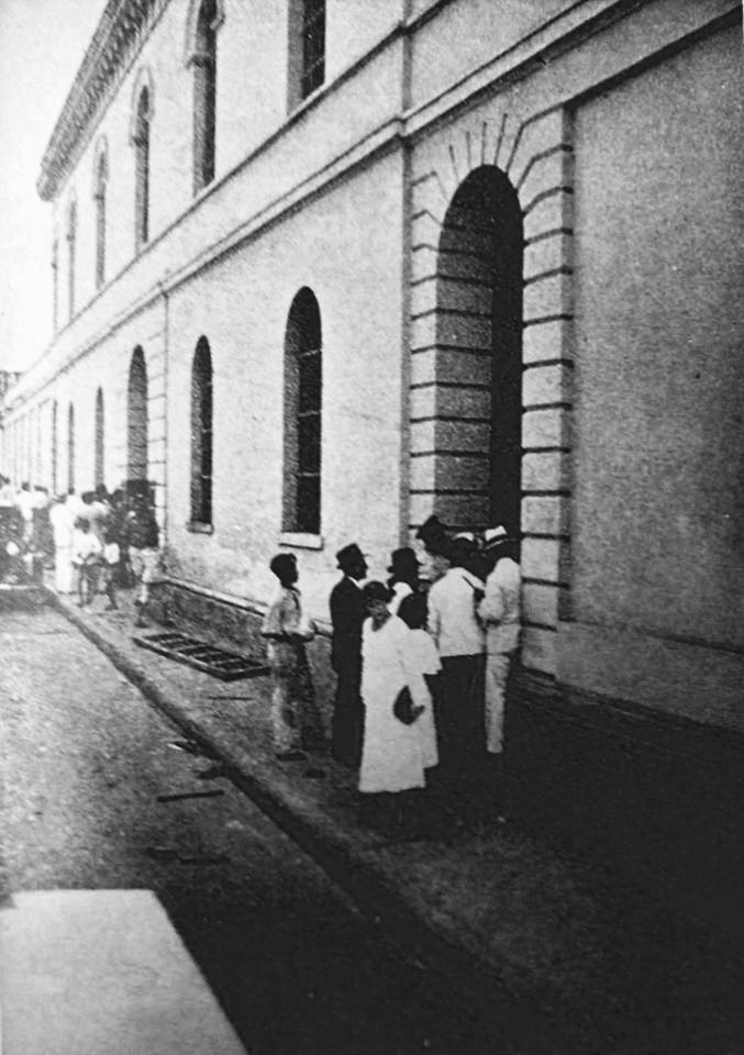 Fachada exterior de la cárcel venezolana "La Rotunda", fotografiada un día de visita. Familiares y amigos de los presos esperan a las puertas para entrar.